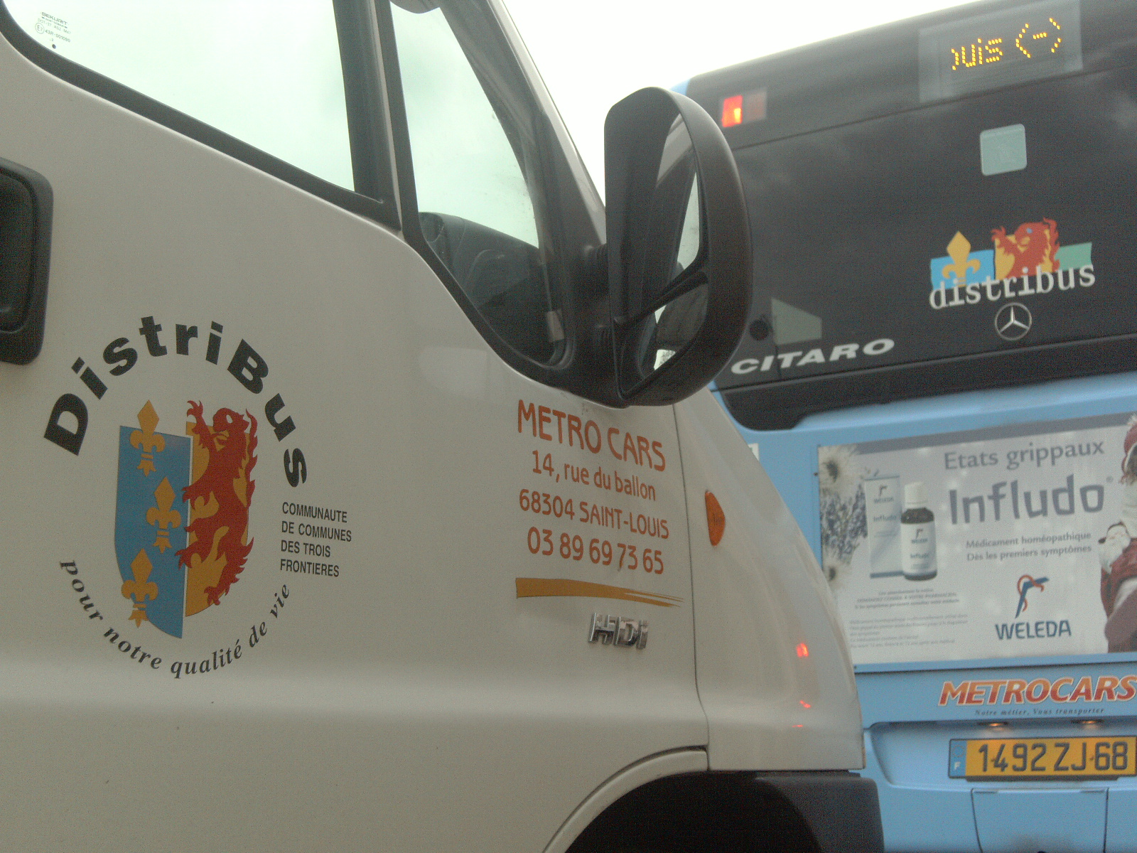 L'ancien logo Distribus (post-2006) sur la porte d'un minibus Peugeot Boxer et le nouveau logo (après 2006) à l'arrière d'un Mercedes-Benz Citaro K, tous deux situés devant la gare de Saint-Louis